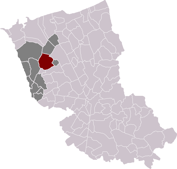 Locatie gemeente Loberge in arrondissement Duinkerke. Zelfgemaakt. Location of Looberghe municipality in the arrondissement of Dunkirk. Self made. Localisation de la commune de Looberghe dans l'arrondissement de Dunkerque. Fait moi-même.